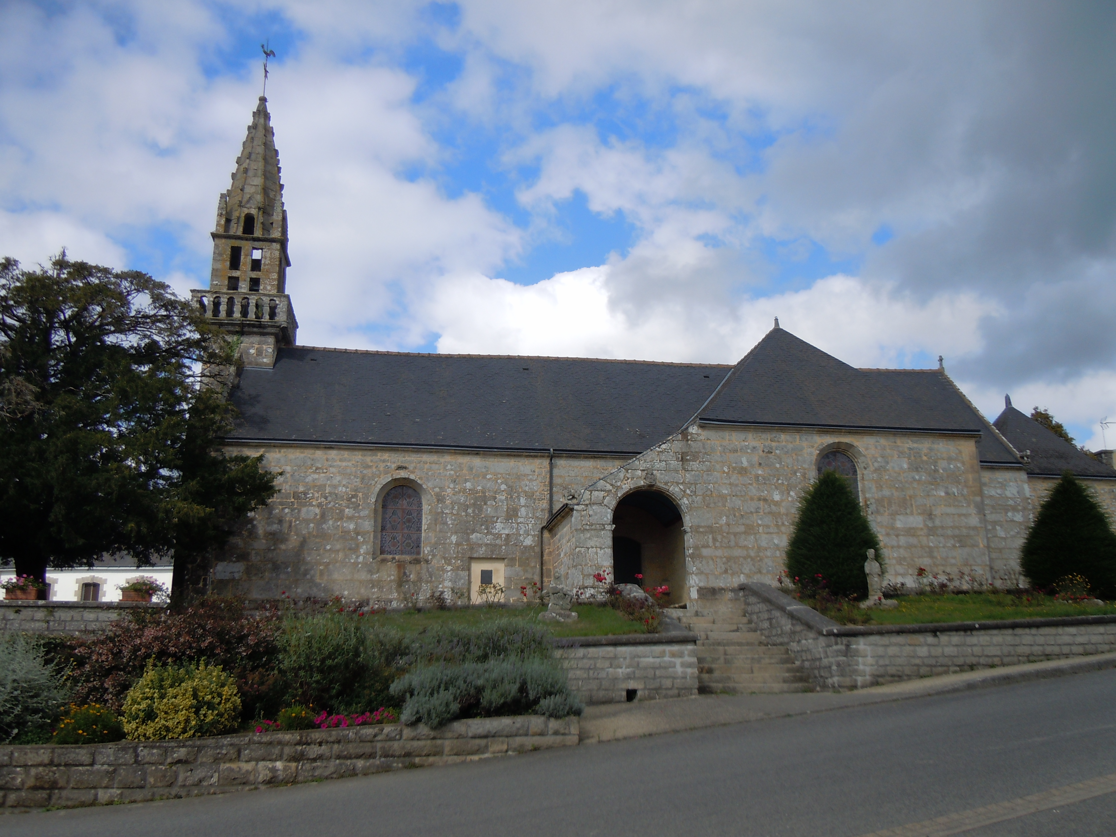 église paroissiale Saint Méen ou Saint Meven de Guilligomarc'h, département du Finistère, France